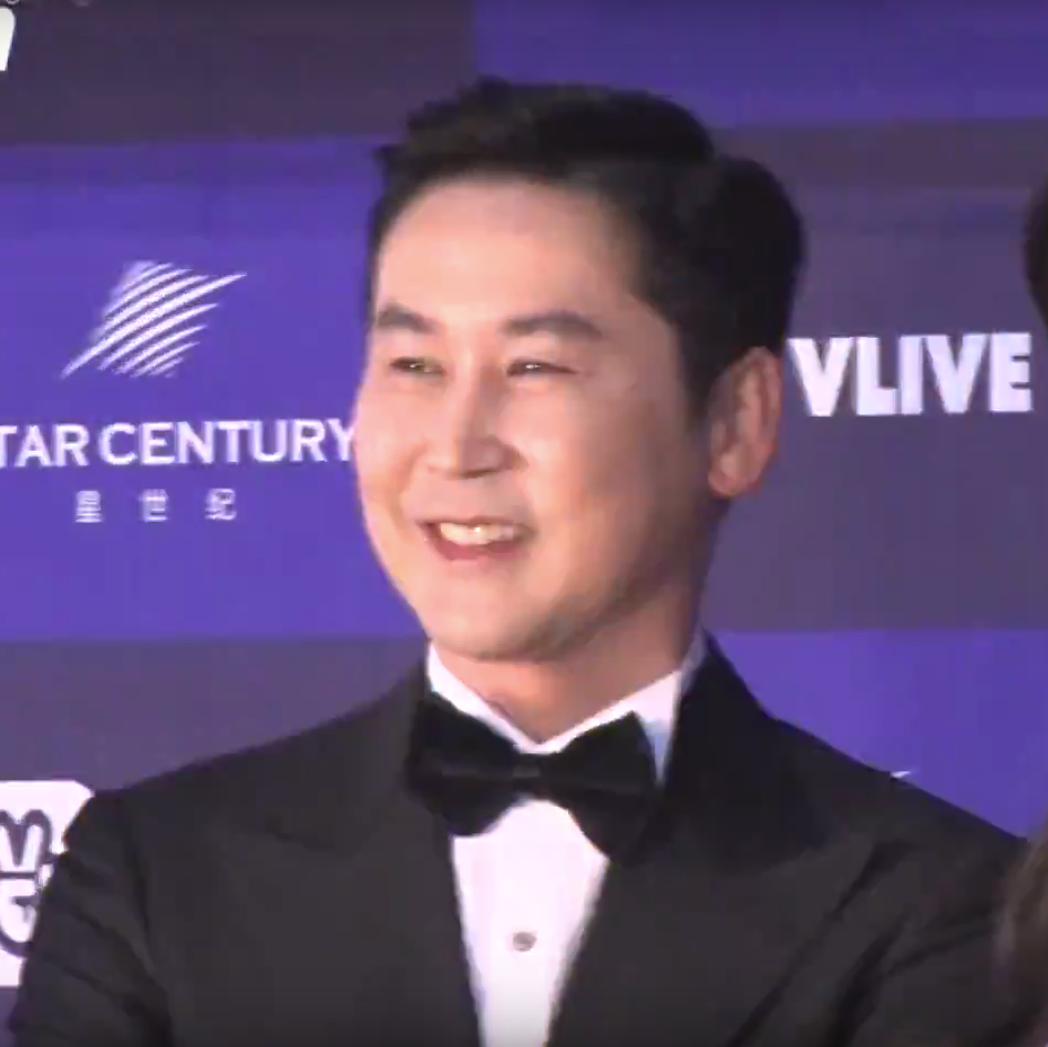 제53회 백상예술대상 레드카펫